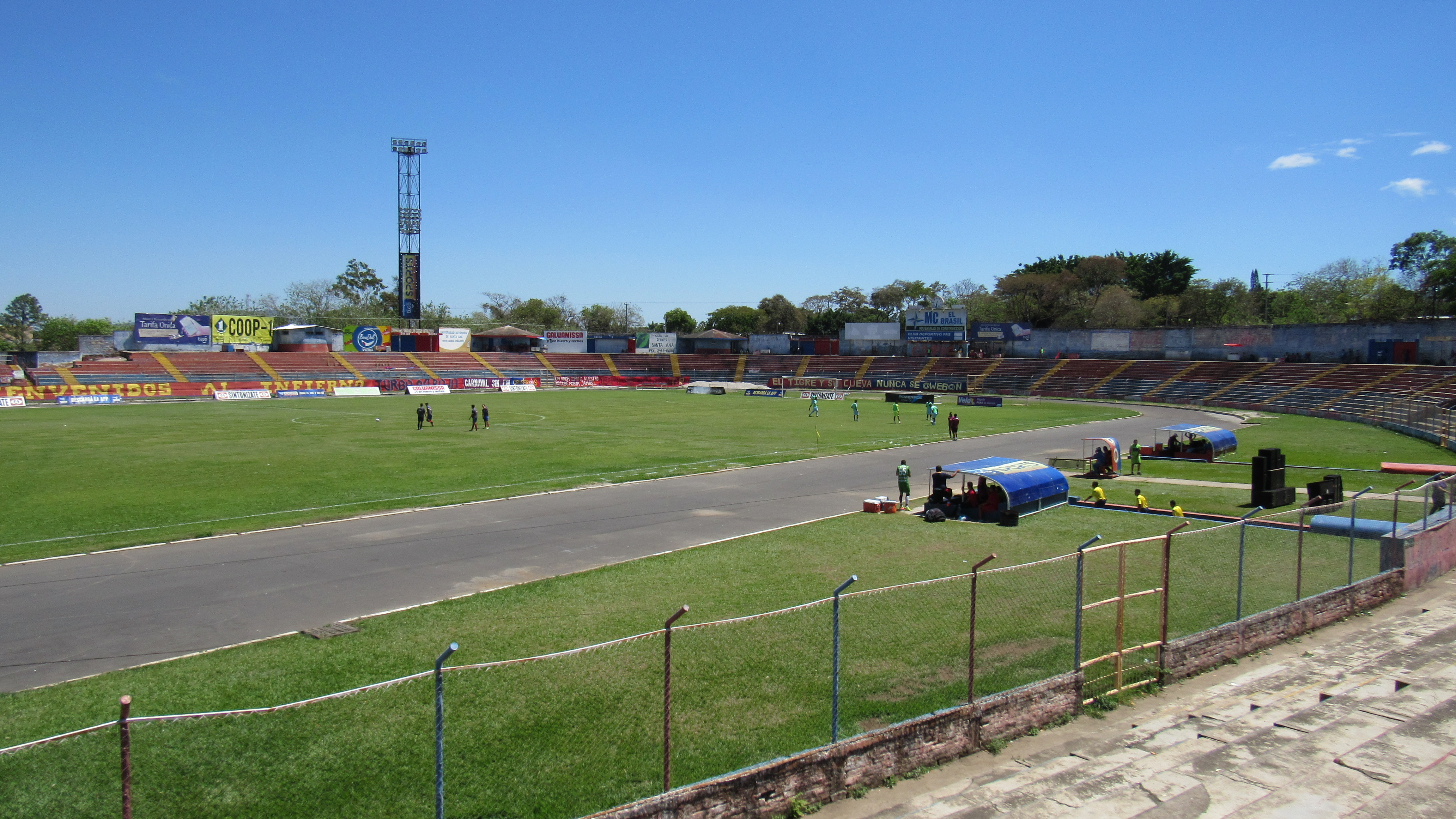 Vista del estadio Oscar Quiteño de Santa Ana